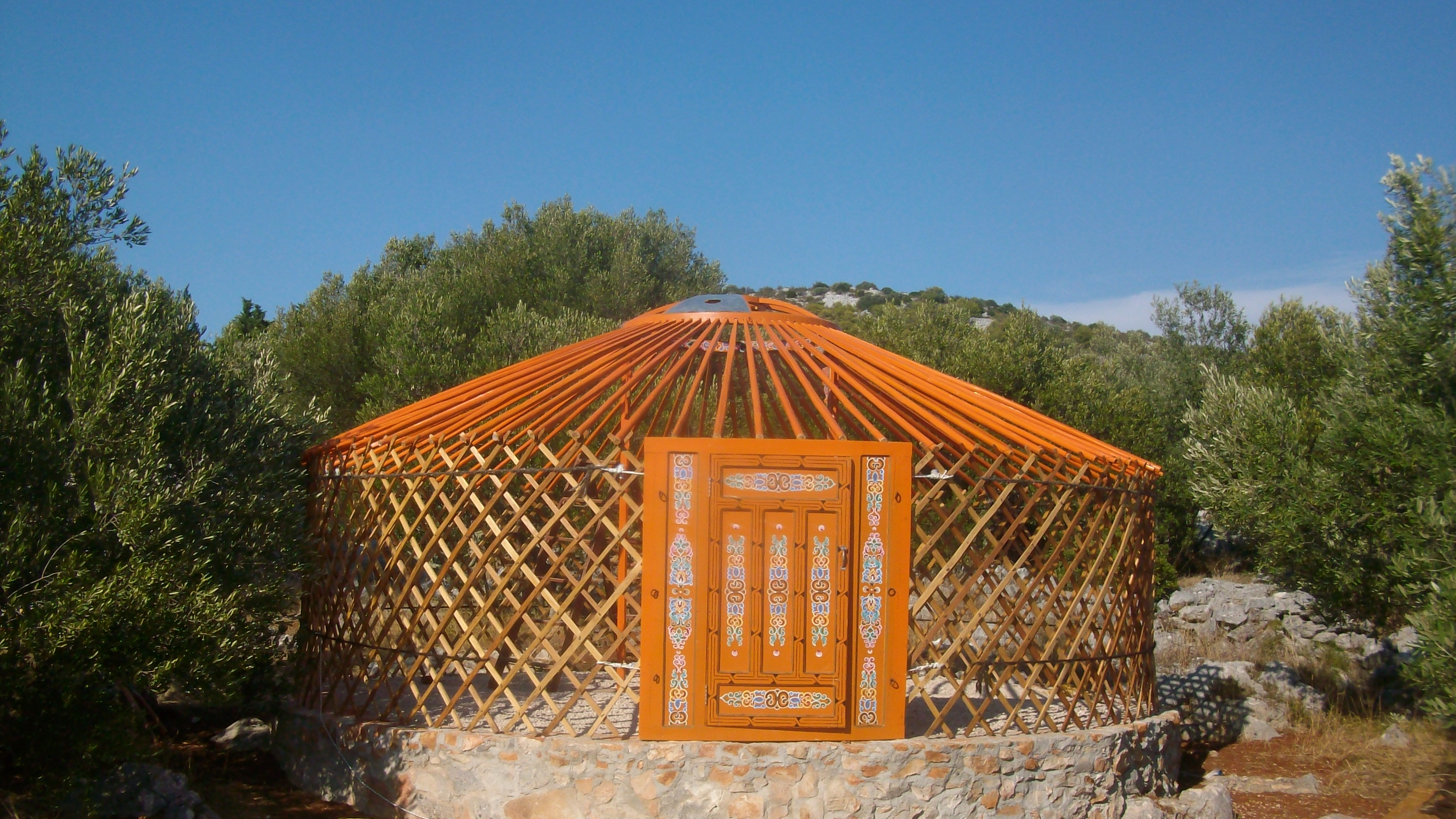 Jurte im Rohbau